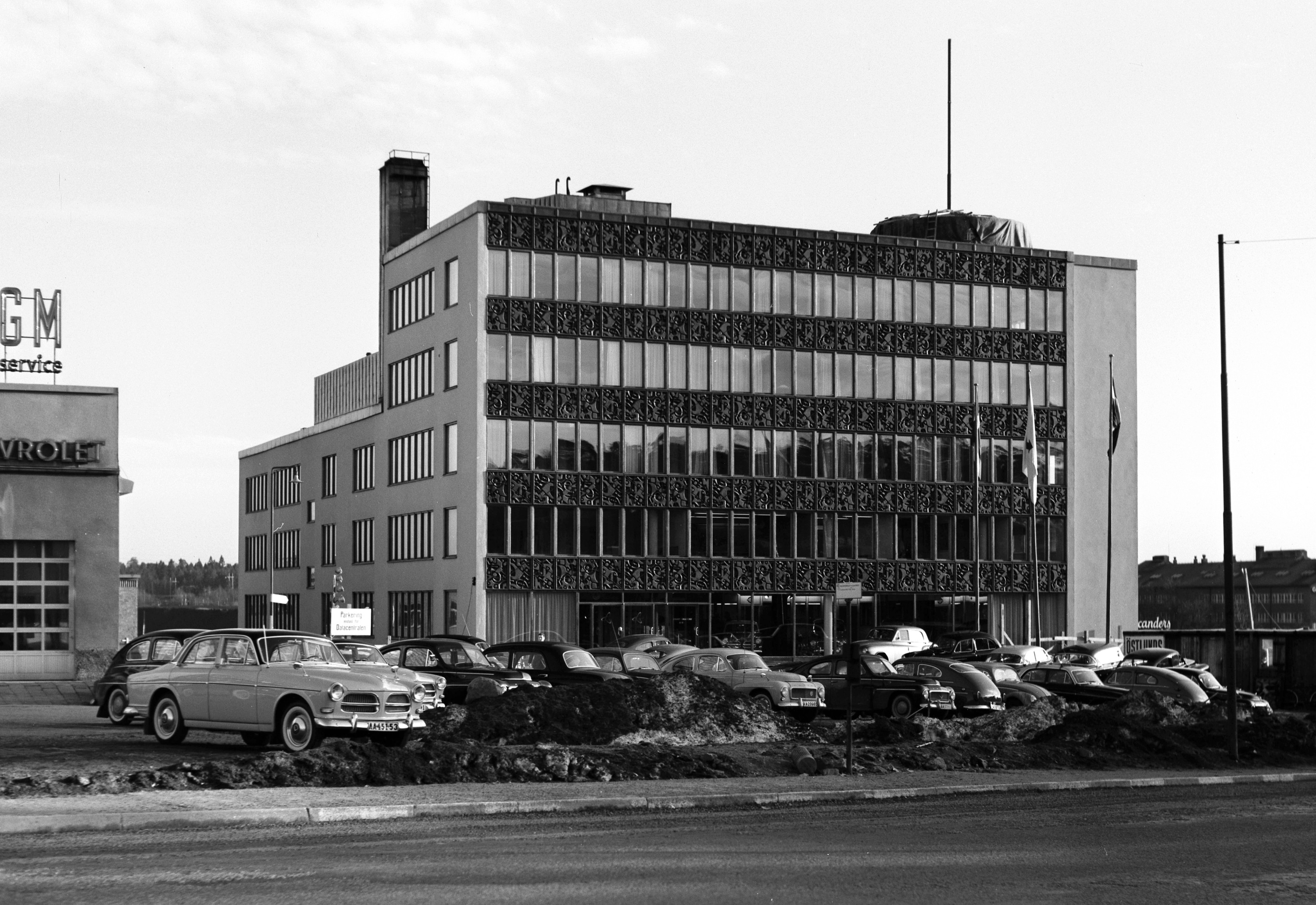 Fastigheten Vreten 17, Västberga industriområde.